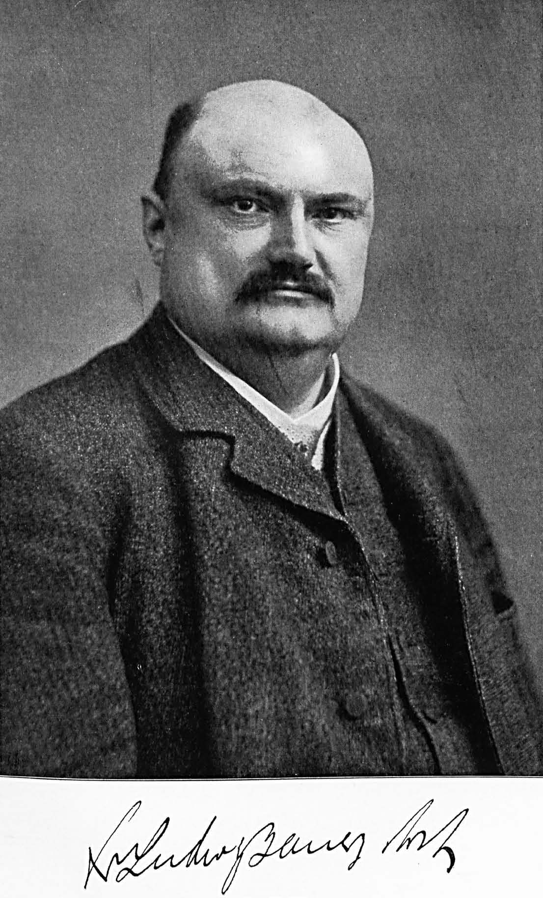 Porträt des Arztes Ludwig Bauer (1863–1911).